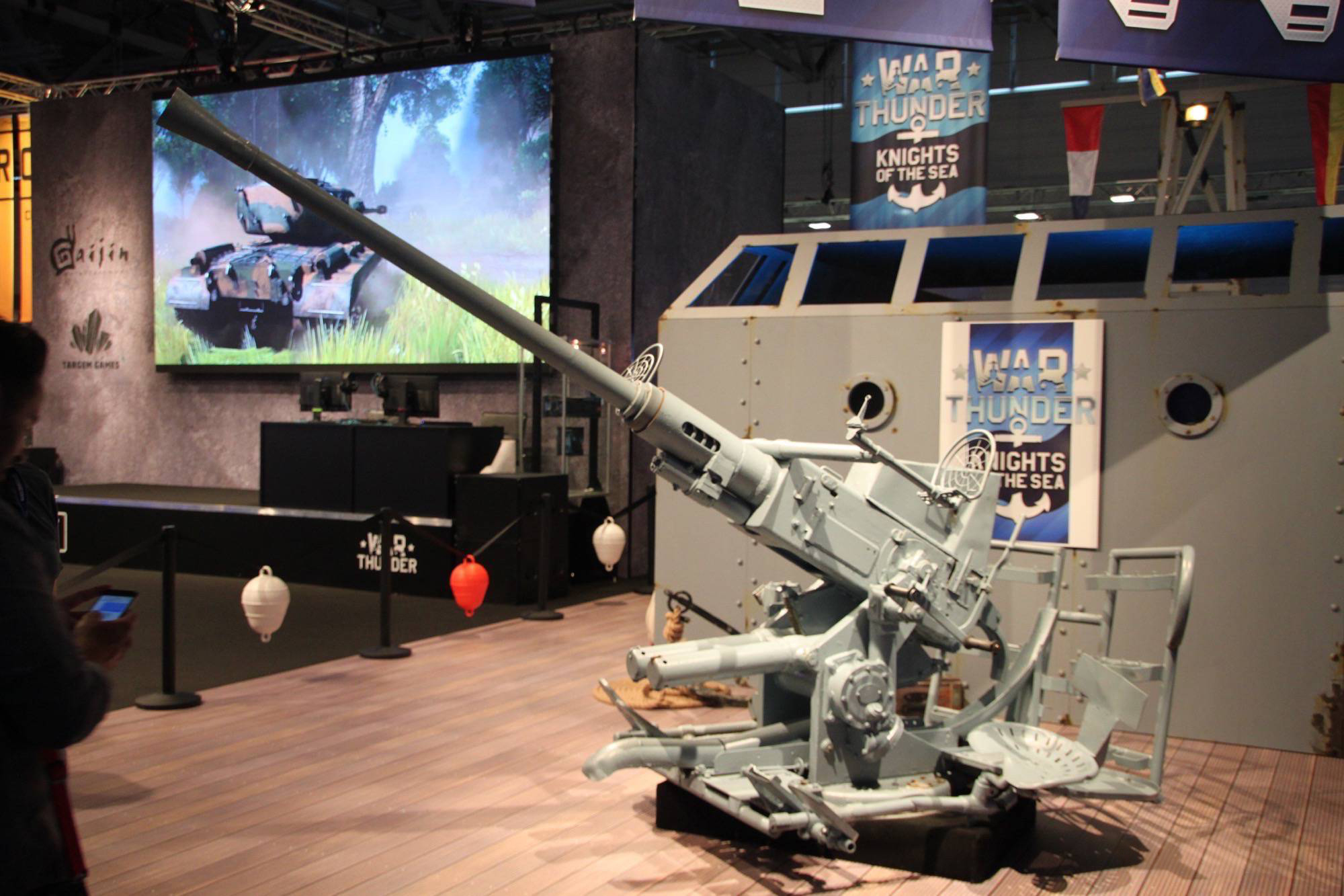 Gamescom 2016 impressions